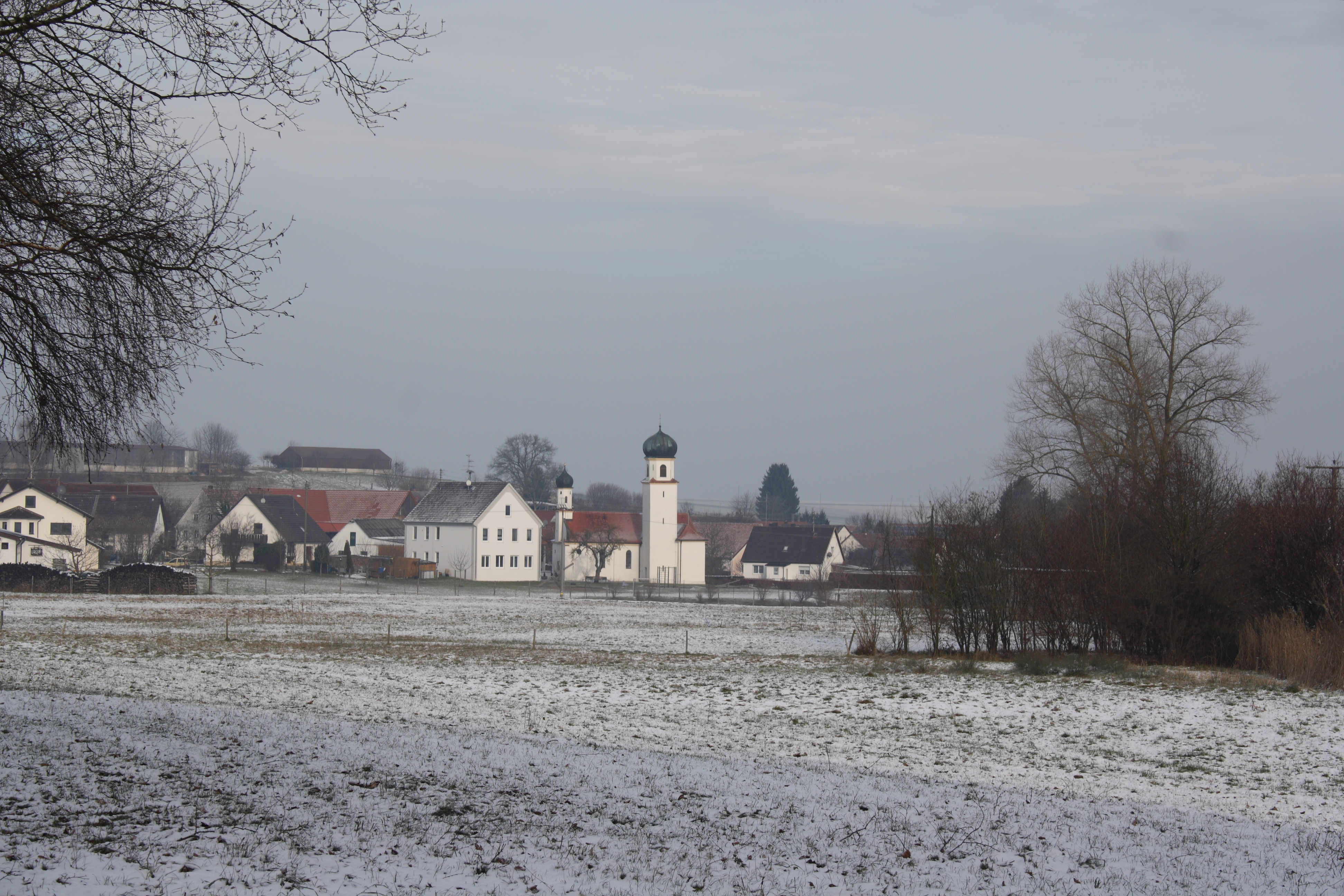 Katholische Filialkirche St. Leonhard in Baumgarten, einem Ortsteil von Aislingen im Landkreis Dillingen an der Donau (Bayern)